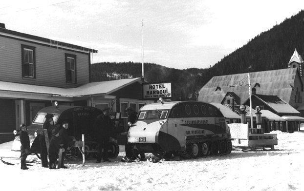 Photographie représentant deux autoneiges (snow) devant l'Hôtel Marsoui. La première, au centre, est identifiée au circuit Sainte-Anne-des-Monts / Rivière-Madeleine et tire une petite remorque à l'arrière. La seconde, à gauche, est identifiée à la compagnie Candego Mines ltd. L'hôtel est pourvu de deux pompes à essence des compagnies Esso et Imperial. Sur l'affiche, on indique que le propriétaire de l'établissement est A. Lever. À l'arrière-plan, à droite, on aperçoit l'église de Marsoui. Musée de la Gaspésie. P1/16/1.